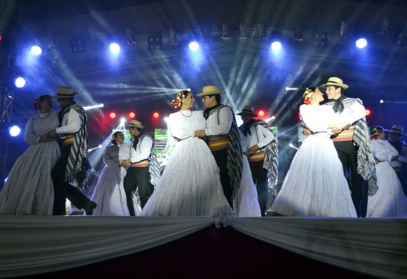 Danza de los 15 años, en el Festival del Poncho Para'i de 60 listas